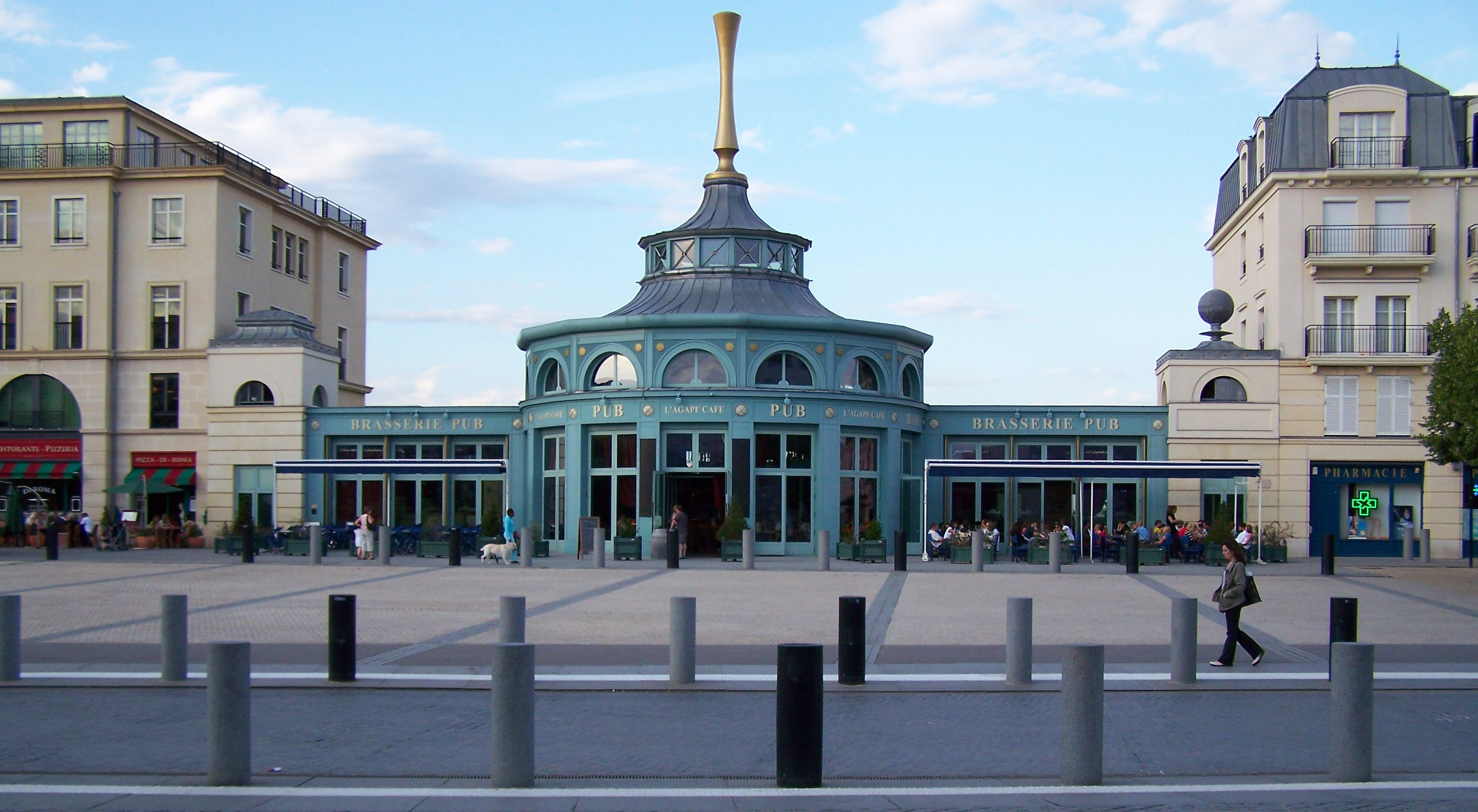 Serris (Seine-et-Marne, Île-de-France, France) : La place d'Ariane et l'Agape Café.